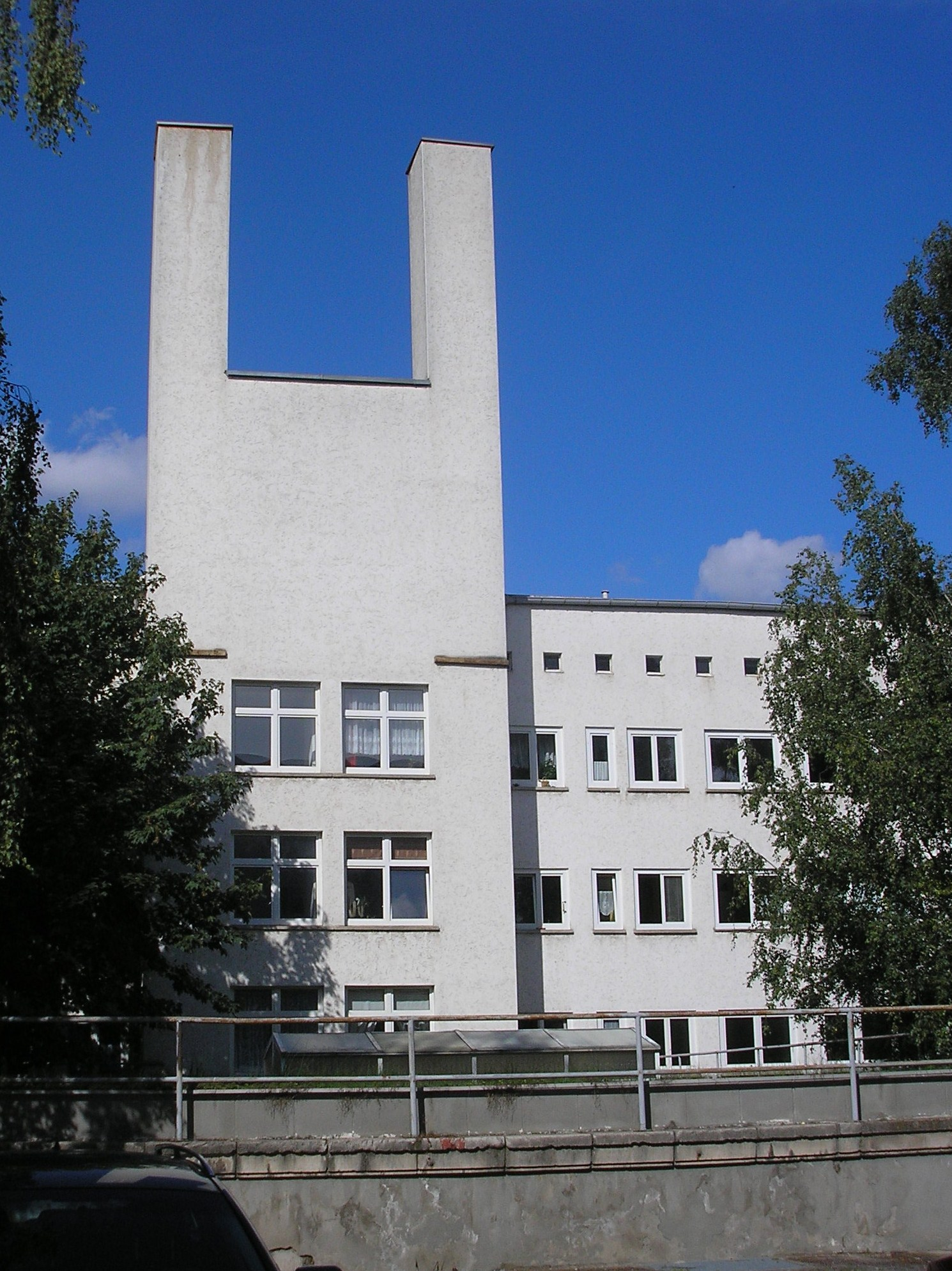 Der Mittelteil der Wohnanlage Hansablock von 1930 in Erfurt.